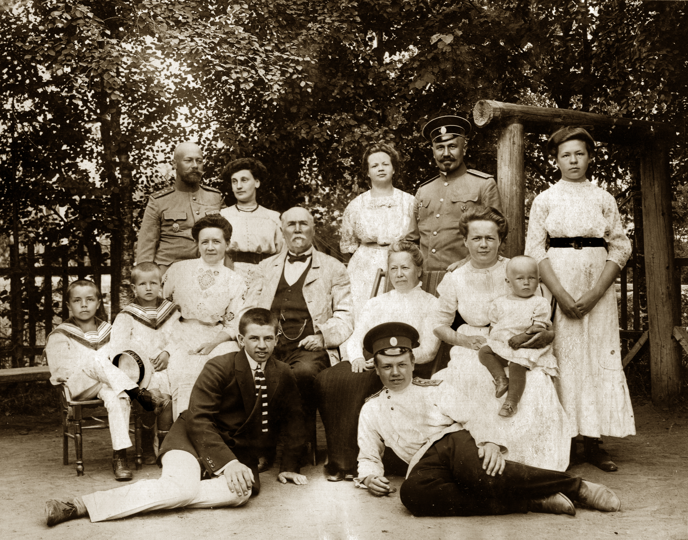 Генерал-Лейтенант фон Гарф, Евгений Георгиевич (1854-1911) с женой, детьми и семьей вице-адмирала Л.Б. Кербера.